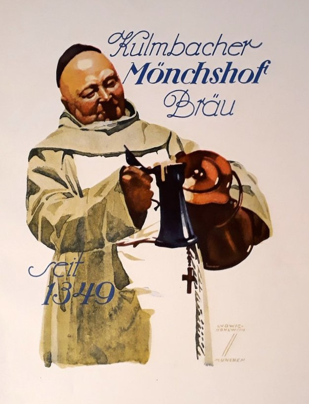 Ludwig Hohlwein - Kulmbacher Mönchshof Bräu, 1926. 22,5 cm x 29,7 cm. Druck: Phönix Illustrationsdruck und Verlag G.M.B.H., Berlin